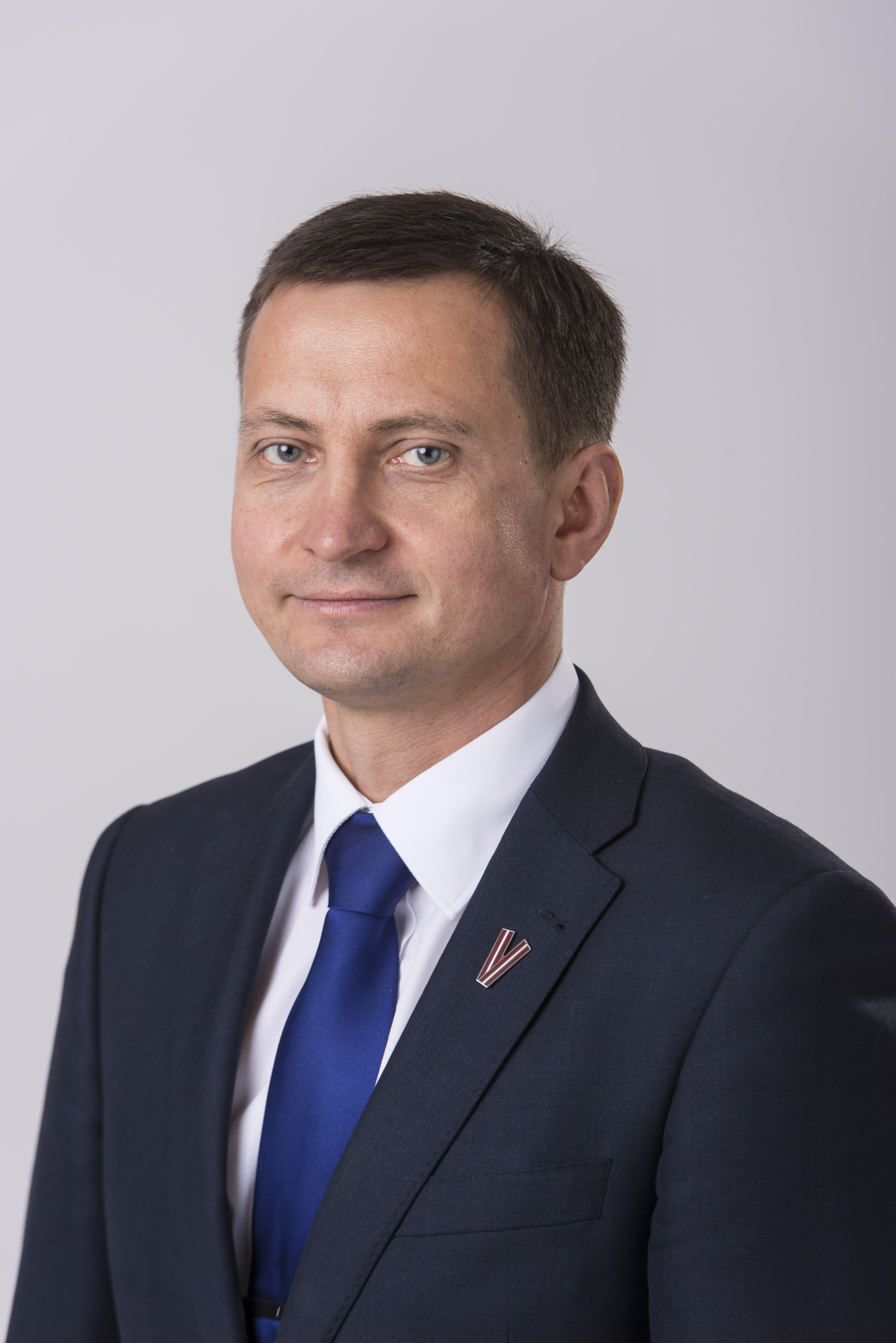 2014.gada 9.decembris. 12.Saeimas deputāts Armands Krauze. Foto: Reinis Inkēns, Saeimas Kanceleja Izmantošanas noteikumi: saeima.lv/lv/autortiesibas